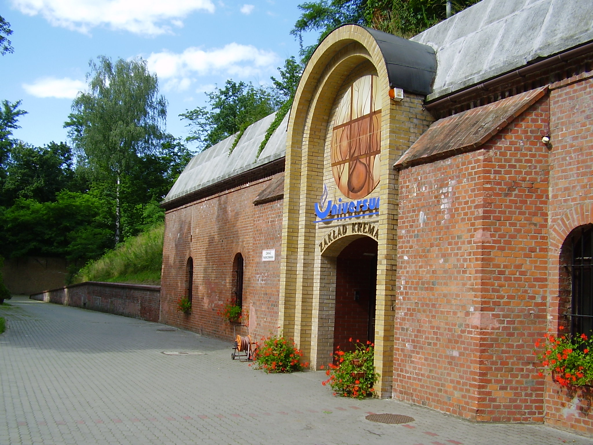 Fort 3a - Poznań